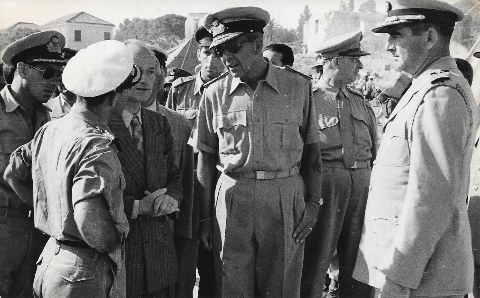 פאול מלך יוון וקציניו בשיחה עם מפקד השייטת אל"מ שלמה אראל בקפלוניה